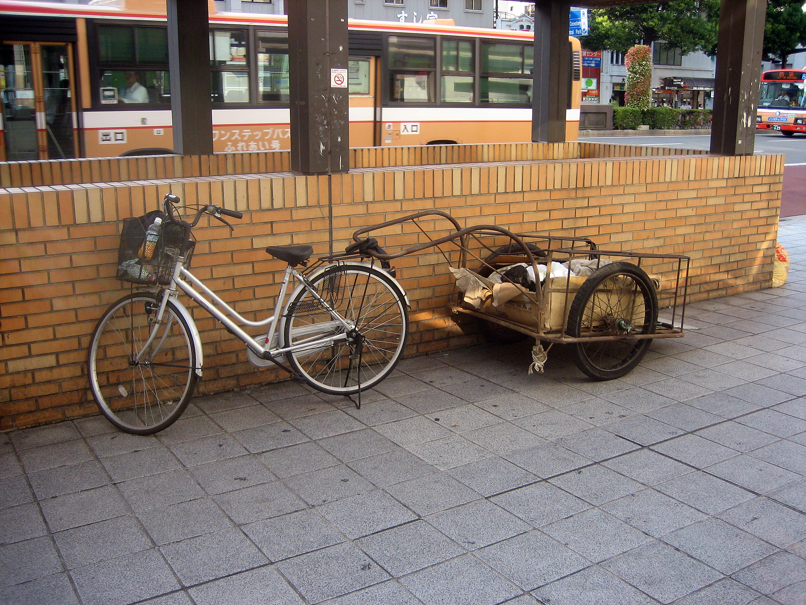 日本にあるリアカー付きの自転車。